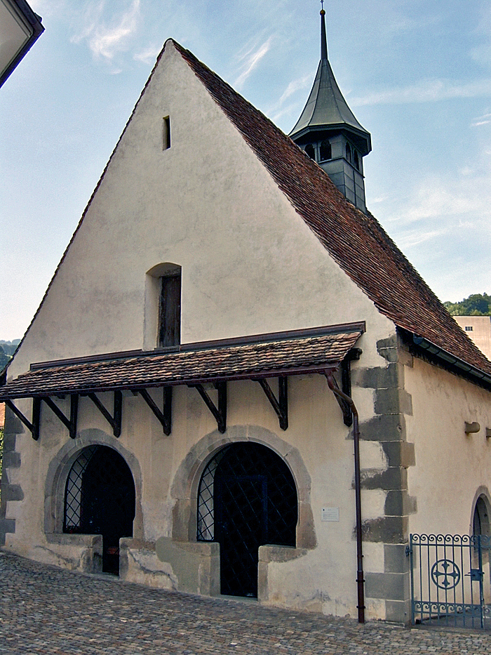 Das Beinhaus von Steinen SZ